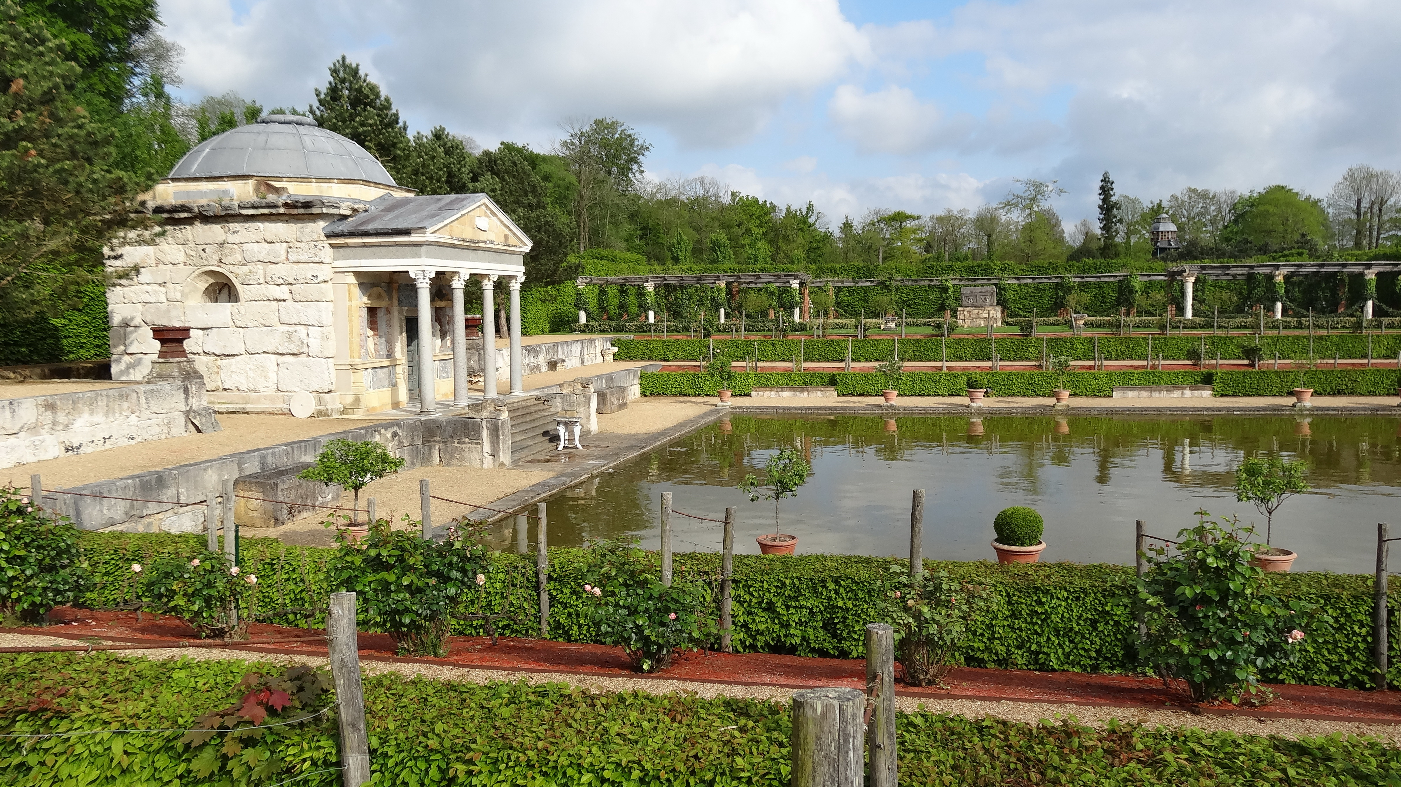 Château du Champ de Bataille - Le Temple du Trésor de Léda